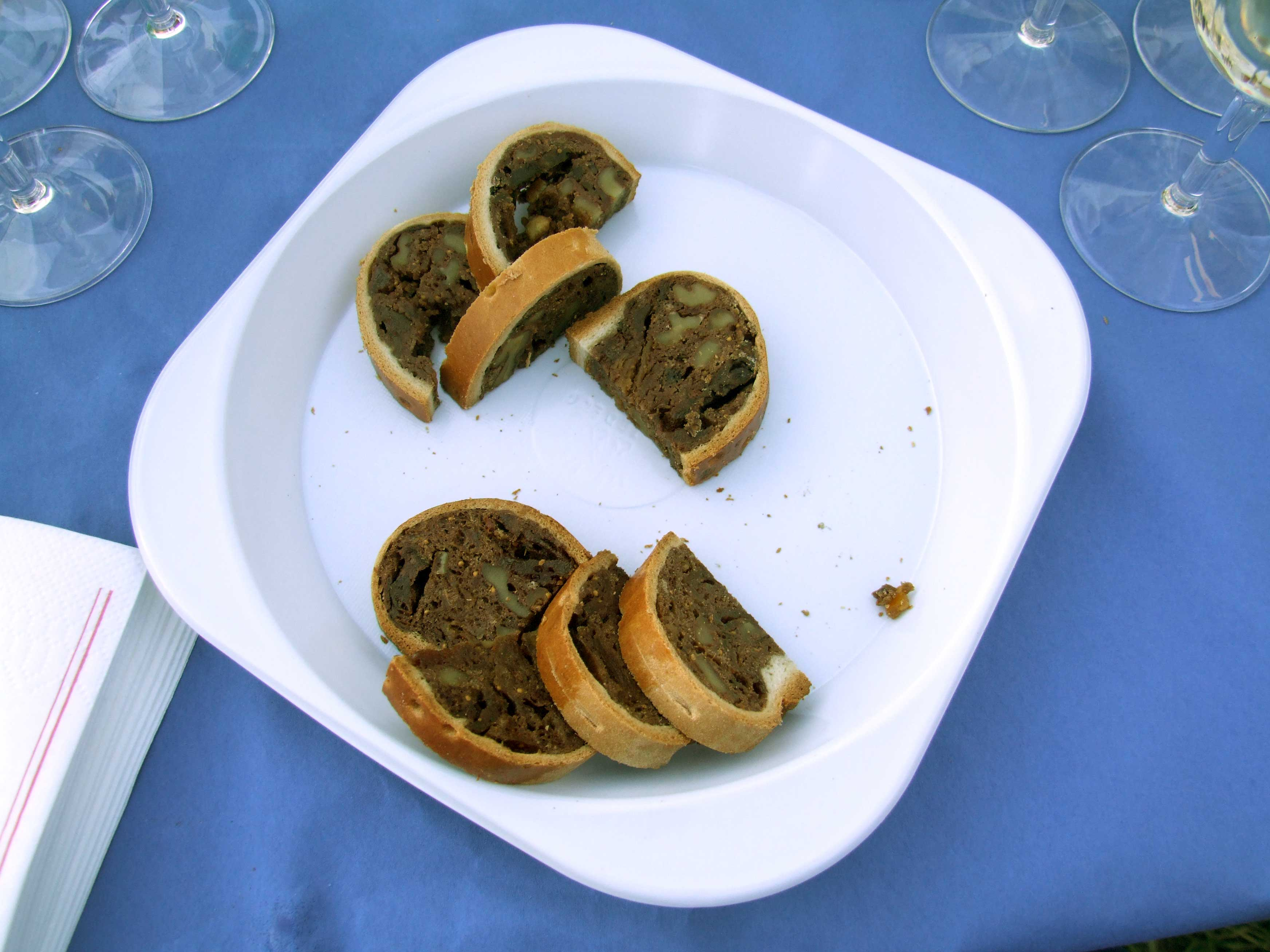 Eine Spezialität aus Graubünden: Birnenbrot ; Hier serviert für die Premierengäste der Heidi-Freilichspiele in Maienfeld auf der Heidialm (1111 müNN). Gereicht wurden noch Salsiz und Käse sowie Maienfelder Wein.